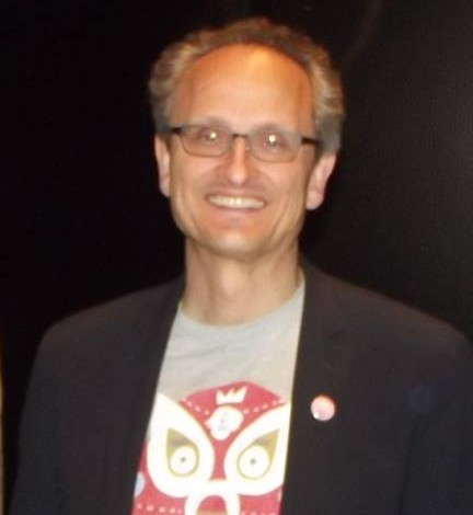 Jan Pinkava au festival international du film d'animation d'Annecy 2018.